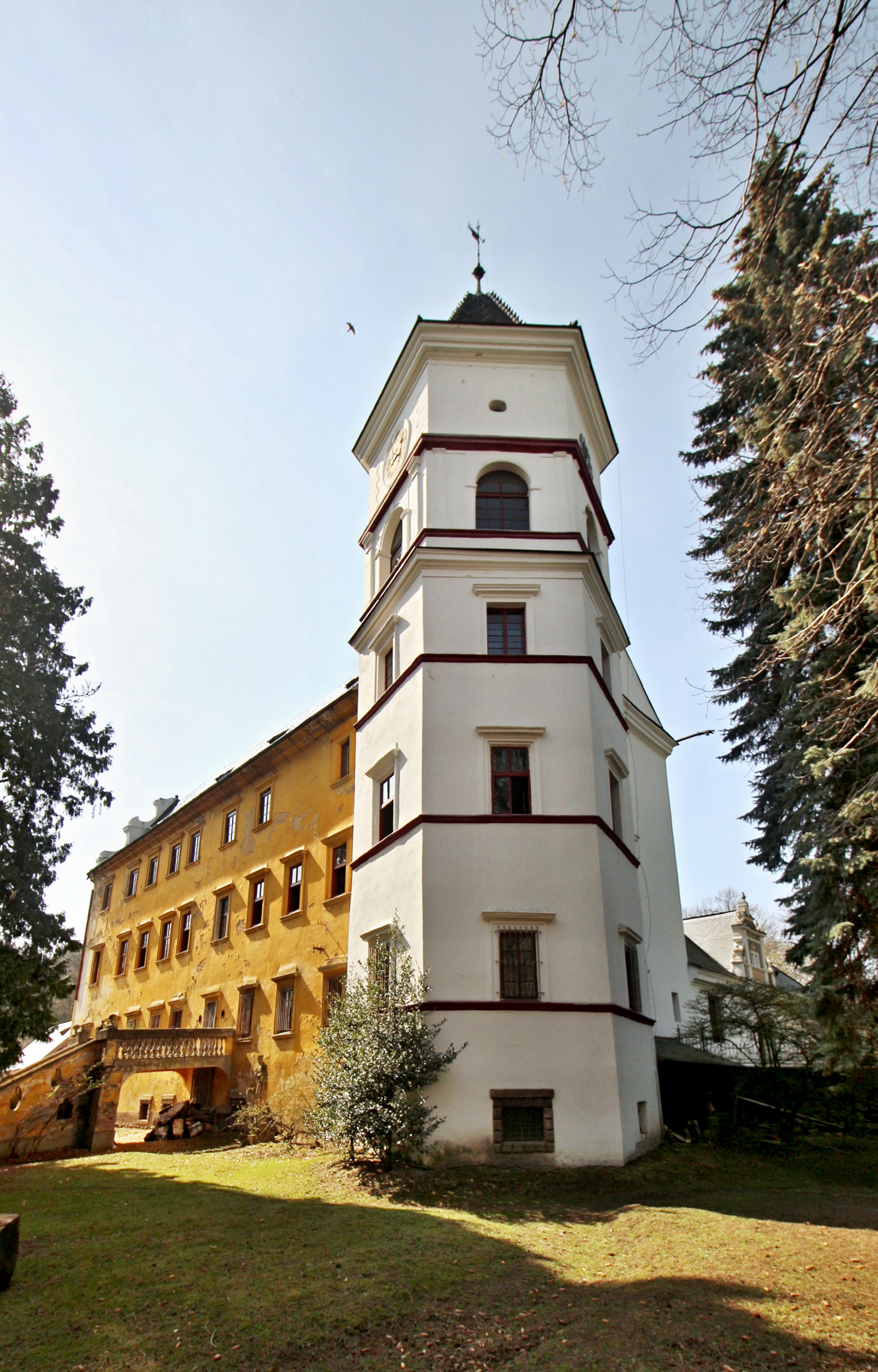 Zámek Radim se zámeckým parkem